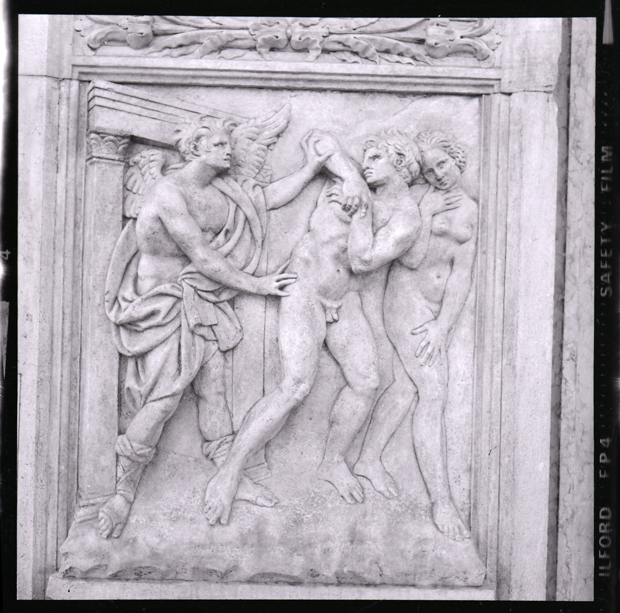 Servizio fotografico : Bologna, 1980 / Paolo Monti. - Buste: 1, Fototipi: 30 : Negativo b/n, gelatina bromuro d'argento/ pellicola ; 6x6. - ((Serie costituita da 30 negativi senza numerazione. Sull busta manoscritto: "Jacopo/ della/ Quercia/ S. Petronio". La suddetta serie è contenuta nella scatola identificata con la numerazione G17501-18000